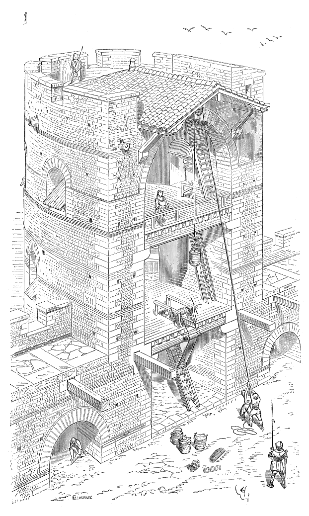 ... Voici (fig. 1) un type de ces tours de la fin de l'empire romain, ouvertes à la gorge, mais interrompant les chemins de ronde des courtines. Des plats-bords posés sur les poutres engagées A permettaient de passer d'un chemin de ronde sur l'autre, et d'entrer de plain-pied au premier étage de la tour. Ce premier étage est mis en communication avec le second et avec le crénelage au moyen d'échelles de bois. Une échelle mobile, que l'on relève au moyen d'un treuil, met le plancher du premier étage en communication avec le sol du chemin militaire intérieur. Cette portion d'échelle relevée et les plats-bords enlevés, le poste gardant la tour ne peut redouter une surprise; il est complétement isolé. Cependant il voit ce qui se passe dans la ville et peut être surveillé. La tour, occupée par l'ennemi, ne peut battre le chemin militaire, puisque les étages de cette tour sont ouverts sur ce chemin. Les approvisionnements de projectiles se font, comme l'indique notre figure, par ces ouvertures sur le chemin militaire ...